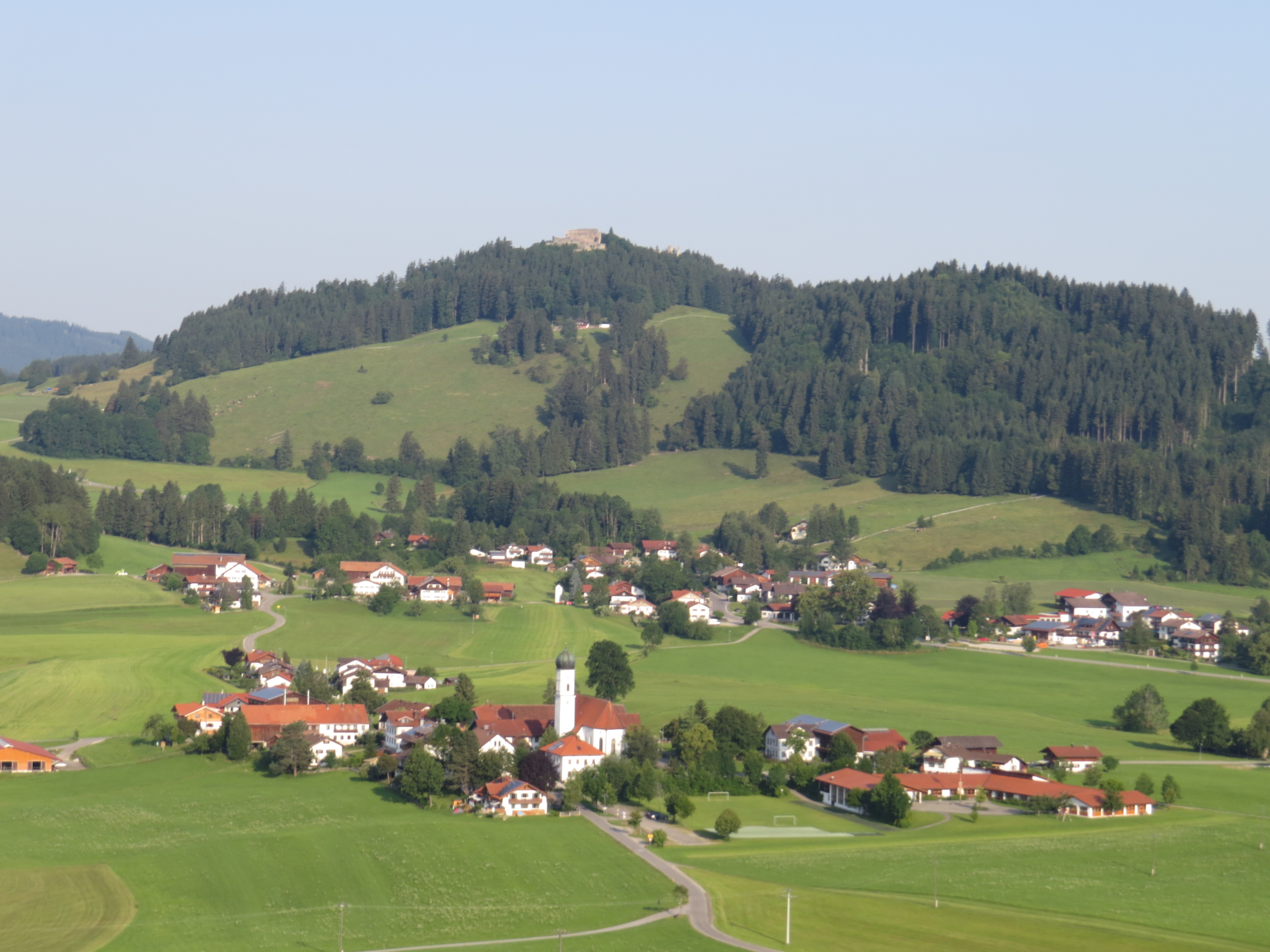 Speiden mit Burgruinen, Eisenberg (Allgäu)